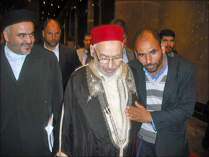 Rached Ghannouchi en visite en Libye, en compagnie de Ali al-Sallabi (à droite de Ghannouchi) l'un des principaux leaders islamistes libyens.